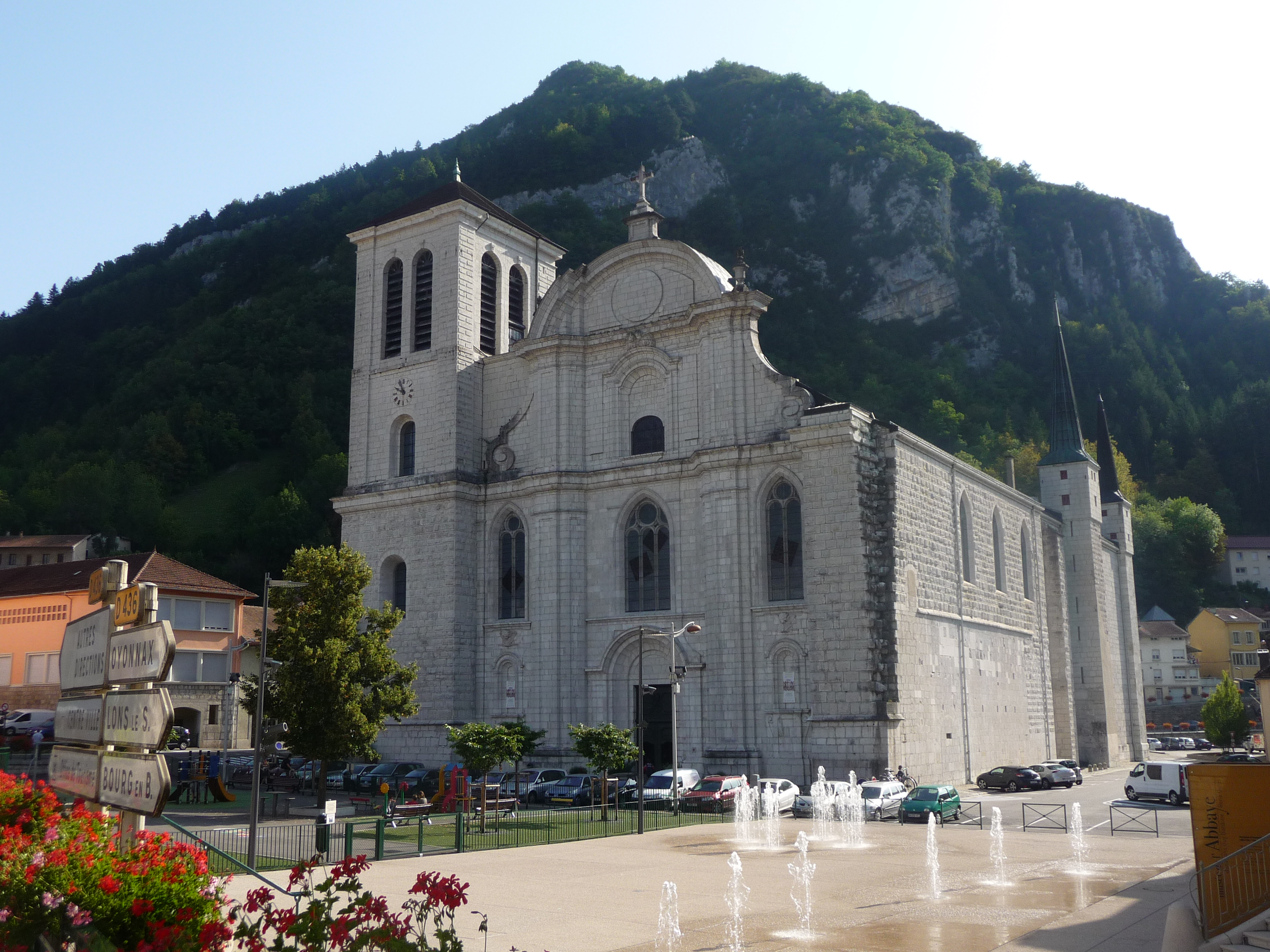 Cathédrale du 14/15ème siècle